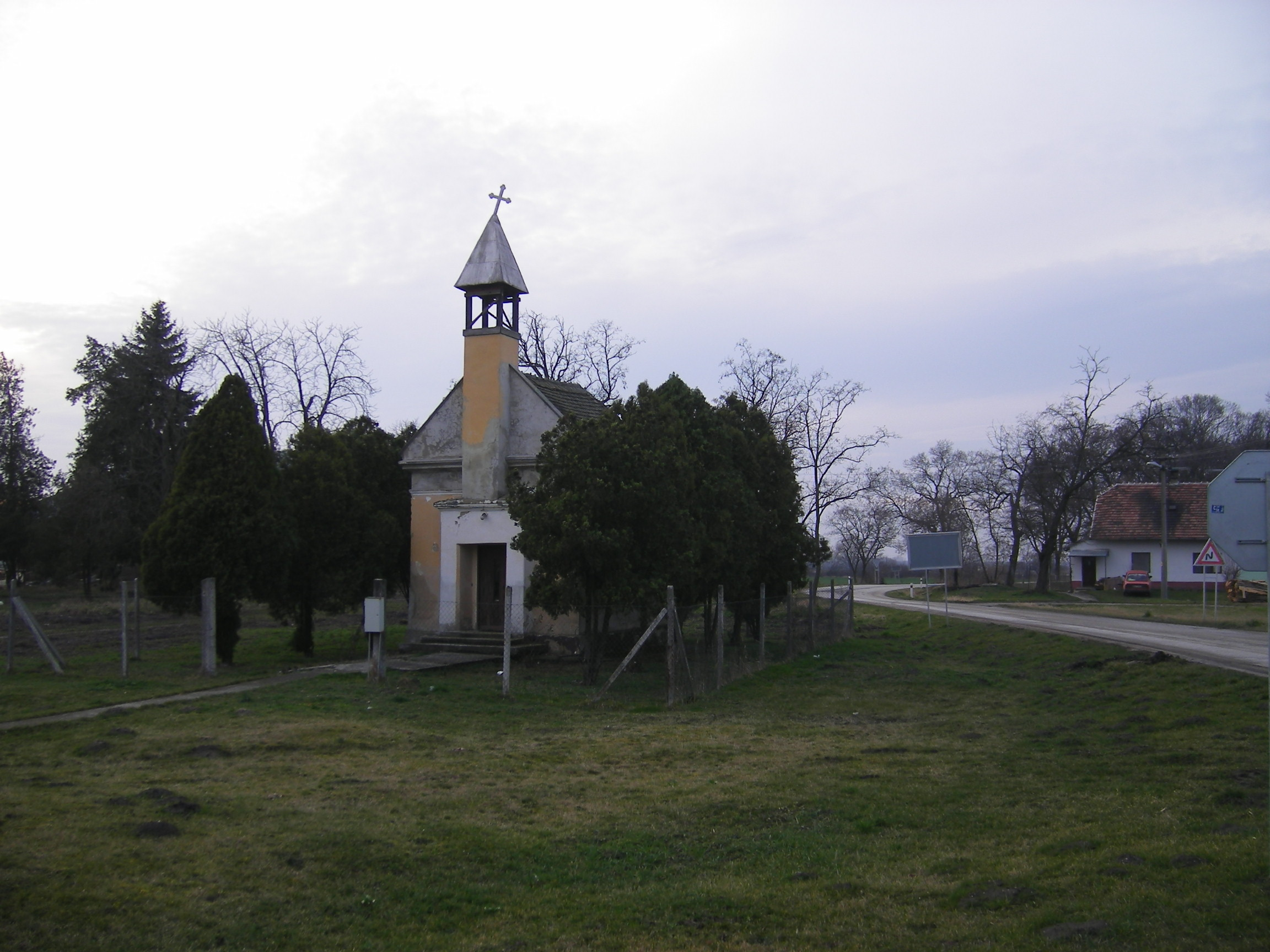 Agyagos-major (Vágfüzes) - kápolna.